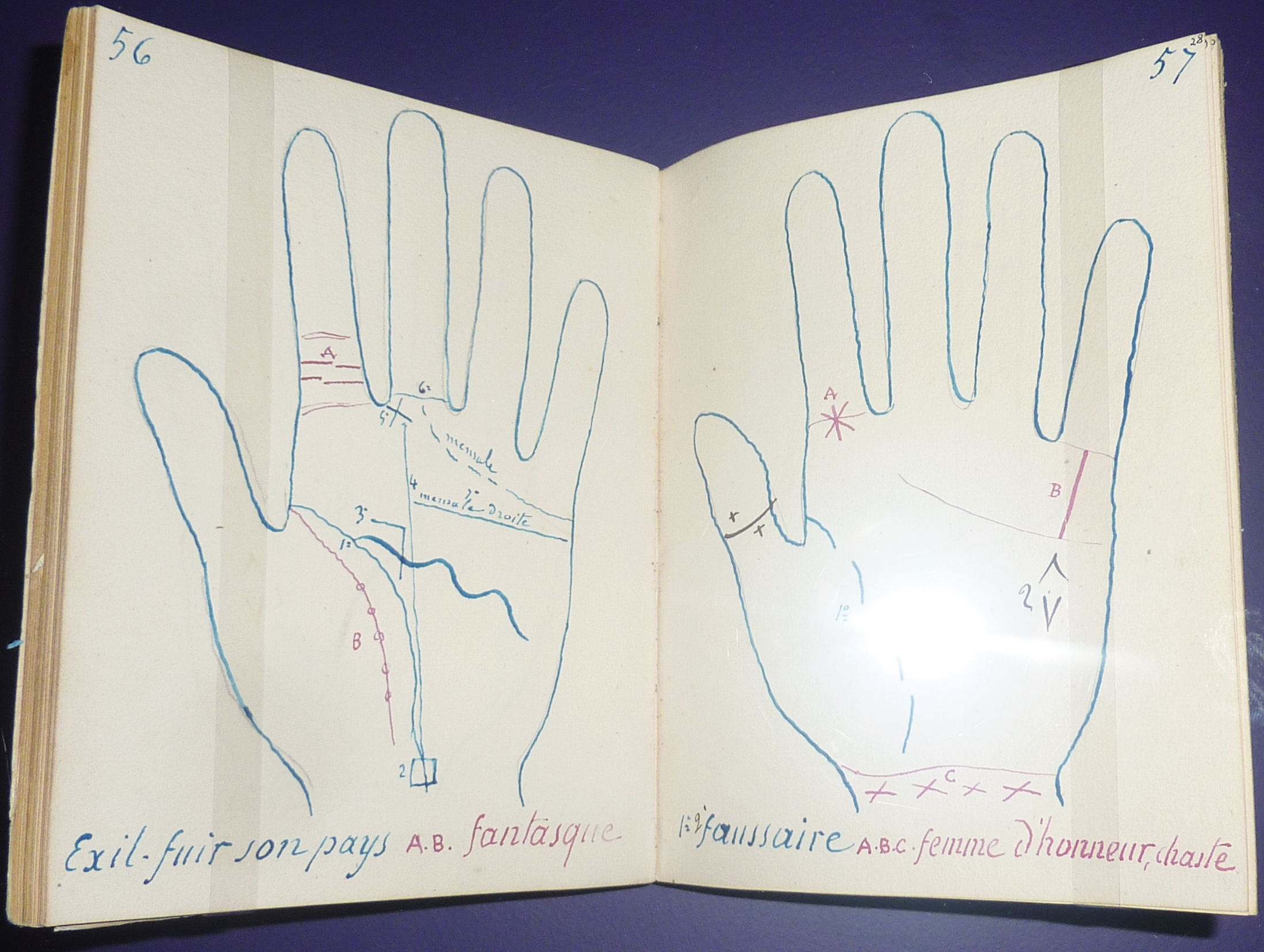 Manuel pour la pratique de la chiromancie , par Jules Charles Edmond Billaudot, dit "Le Mage Edmond" (1845-1880).